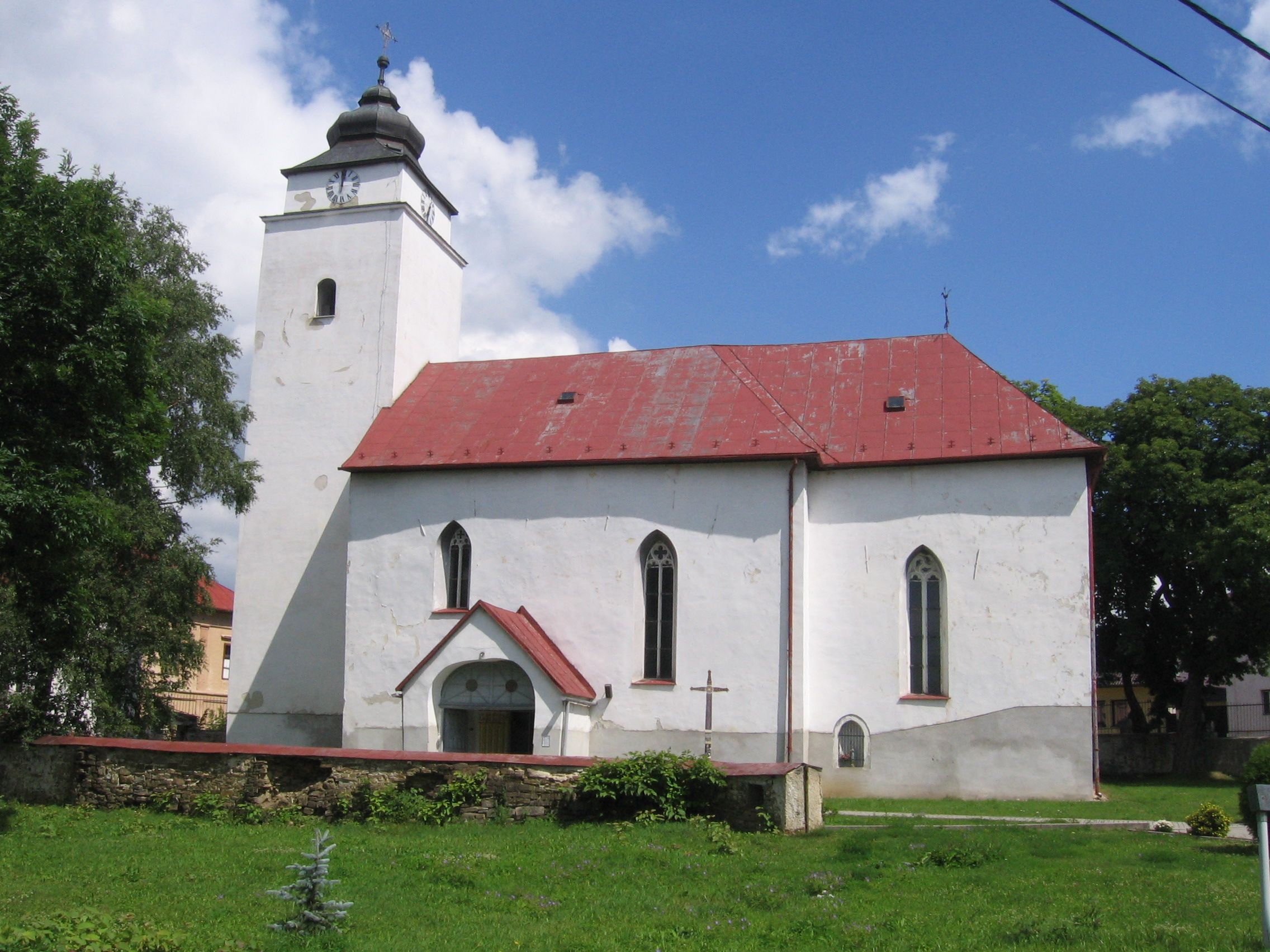 Raně gotický kostel sv. Ondřeje ve Velkém Slavkově.